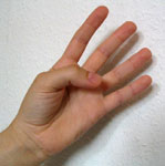 Chinesische Zahl Vier